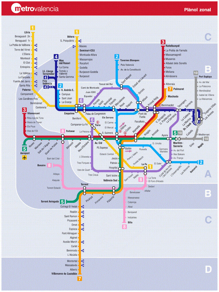 Plànol del futur metro de València amb les línies ja existents (1, 3, 4 5 i 6) i les noves línies 2, 7, 8 i 10 i els eixamples de les línies 1, 5 i 6.